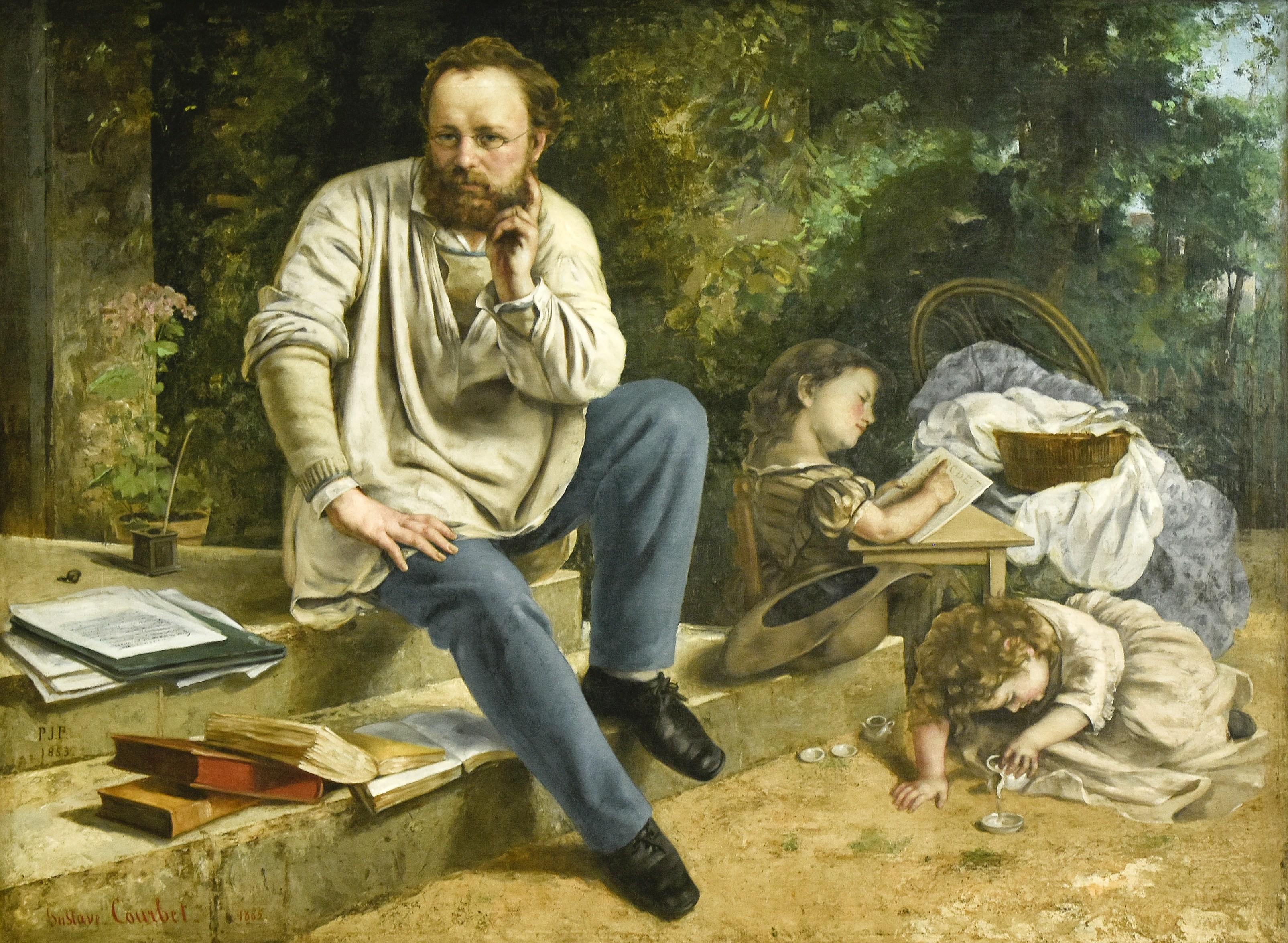 Gustave Courbet (1819-1877) Pierre-Joseph Proudhon en zijn kinderen in 1853 - Petit Palais Parijs